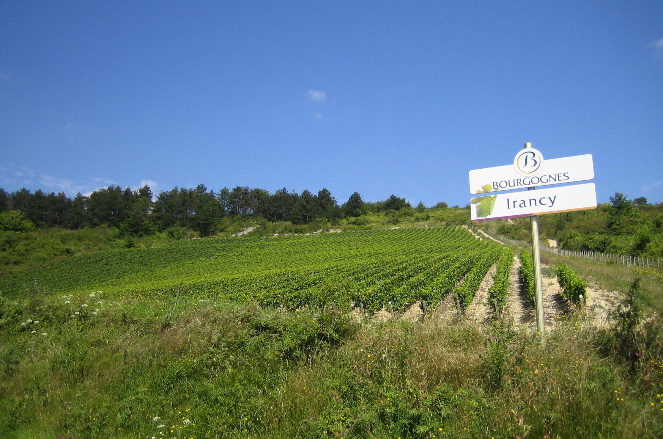 Vignoble d'Irancy (Yonne, Bourgogne France). Août 2009.